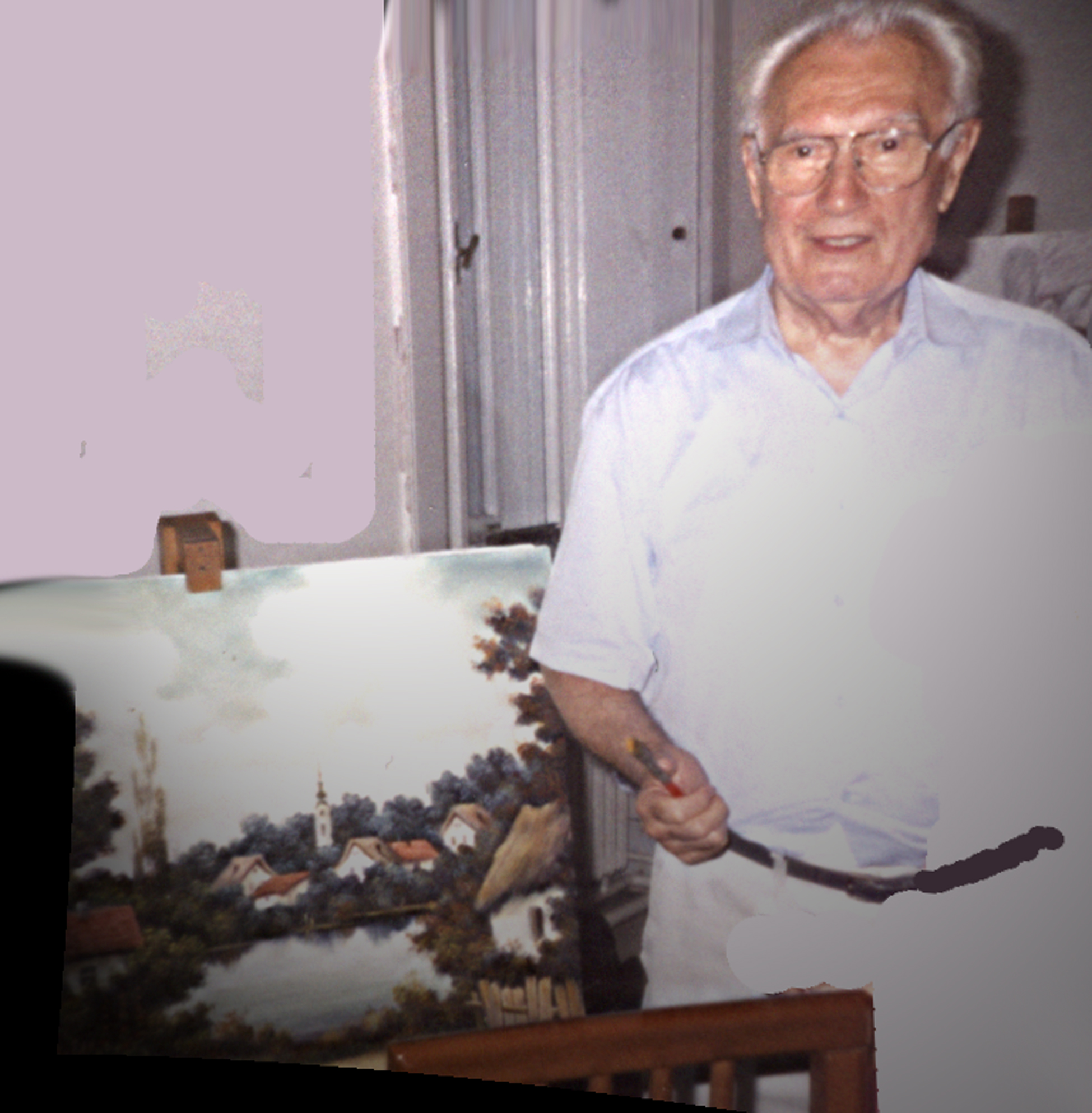 Sava Stojkov na izložbi u Poljoprivrednom muzeju u Kulpinu 2003